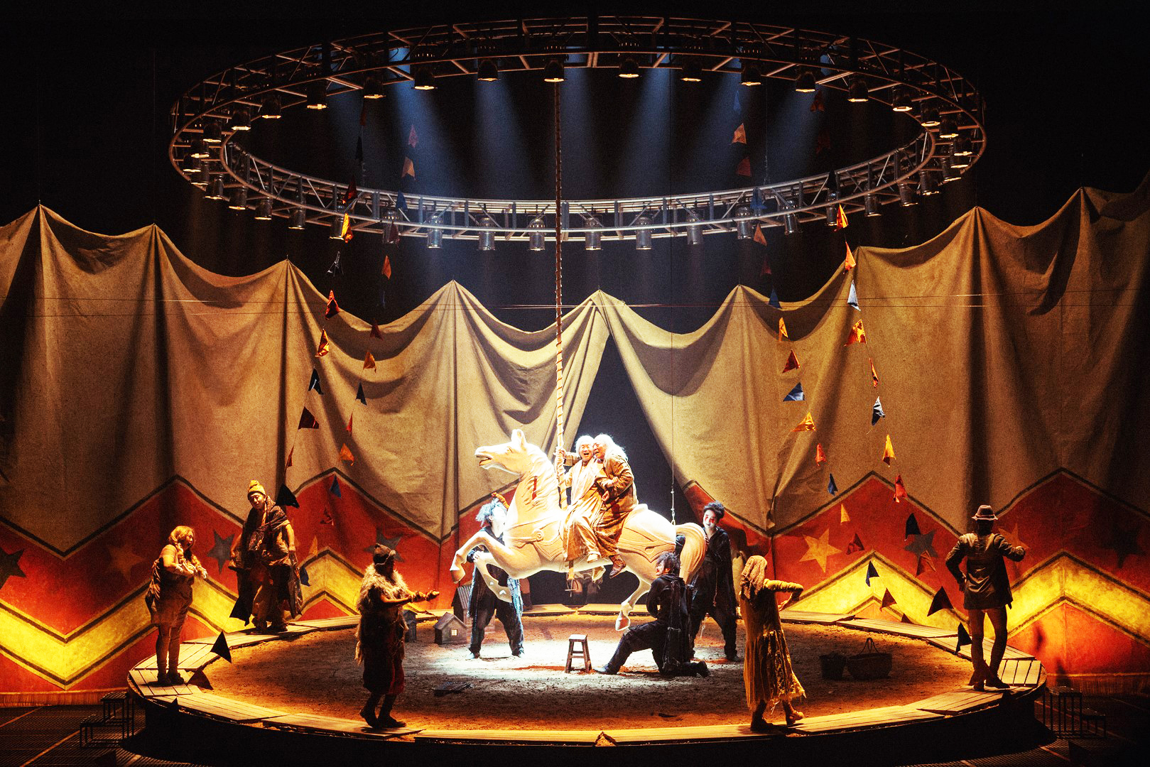 אשכבה, במאי: יאיר שרמן, עיצוב תפאורה: רוני תורן, עיצוב תלבושות: פולינה אדמוב, תאורה: נדב ברנע. בייג'ין, סין, 2019.